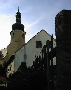 Pfarrkirche von Münchenreuth Fotograf: Walter J.Pilsak Copyright Status: GNU Freie Dokumentationslizenz